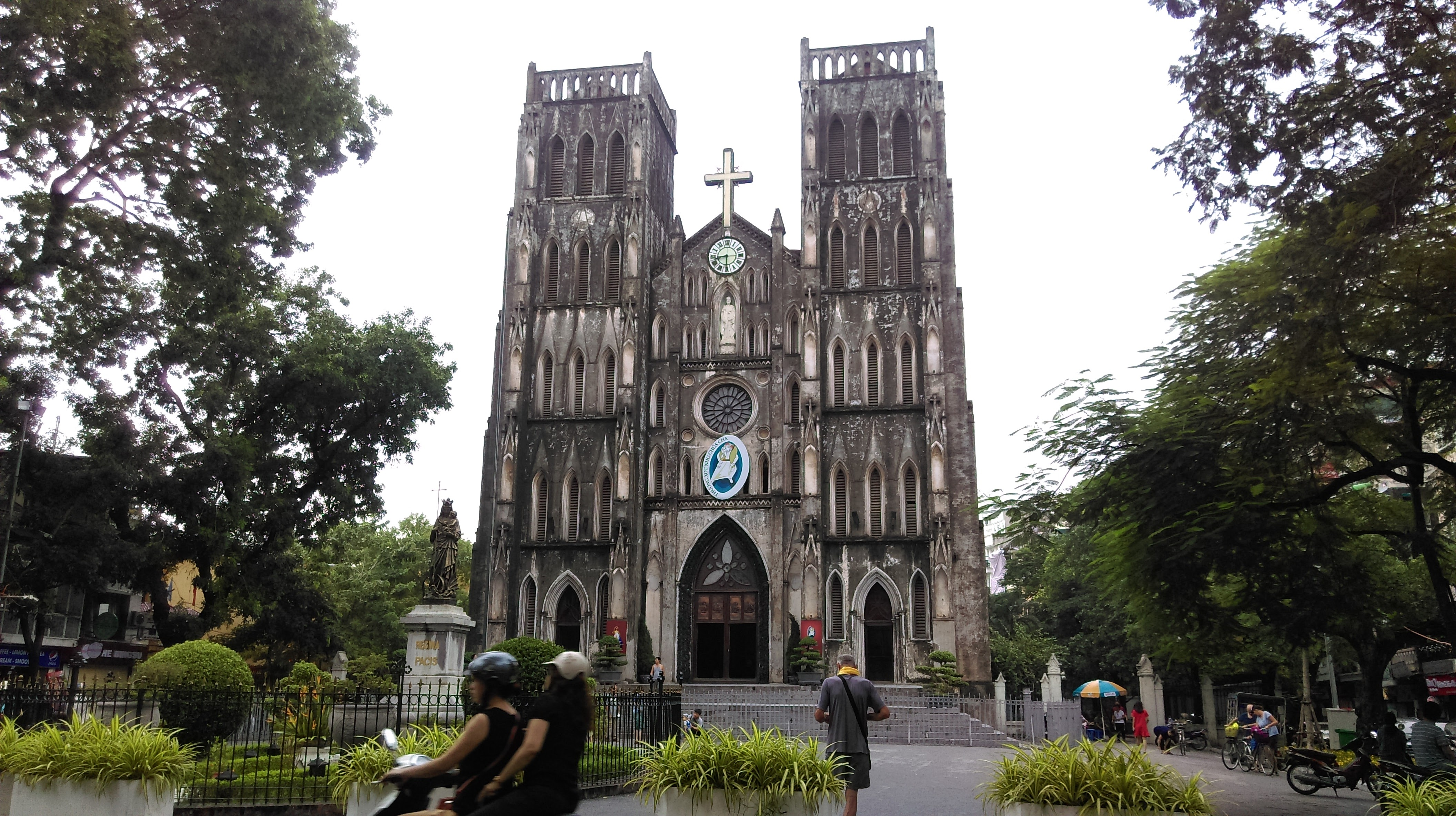 Nhà thờ Lớn Hà Nội